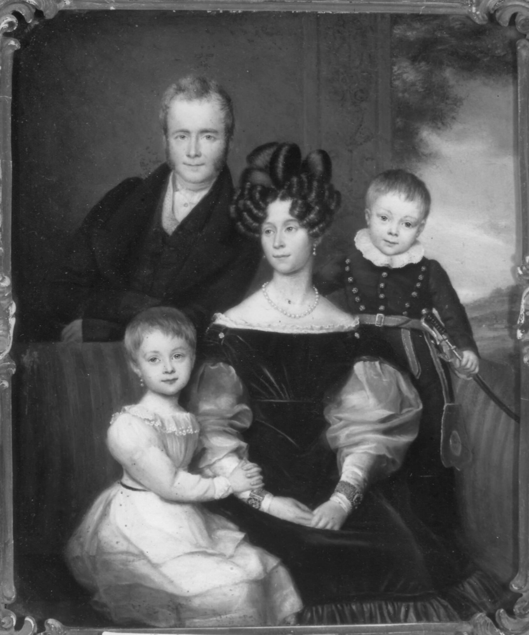 Photo de la famille du baron van Nagell